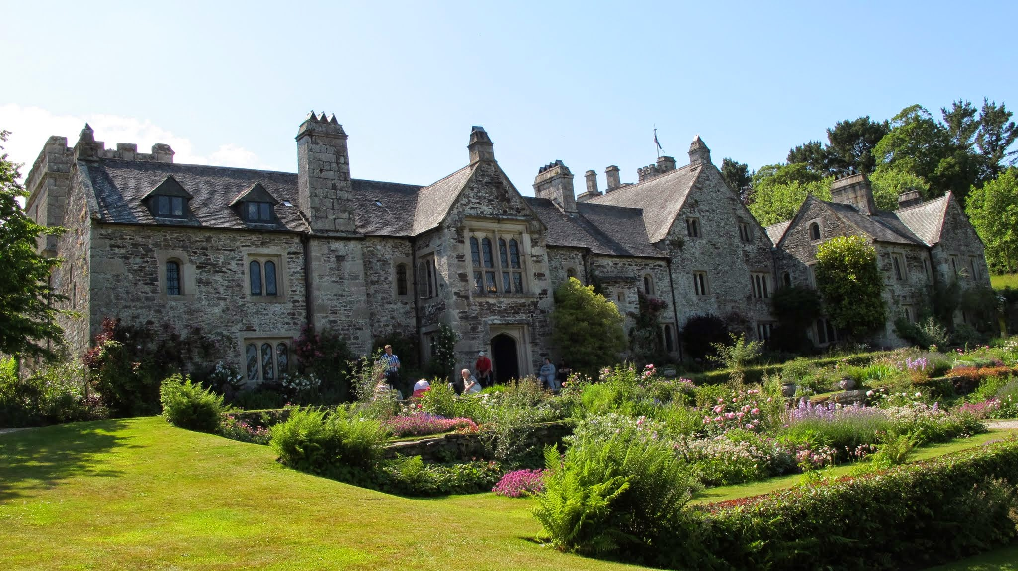 Calstock, UK